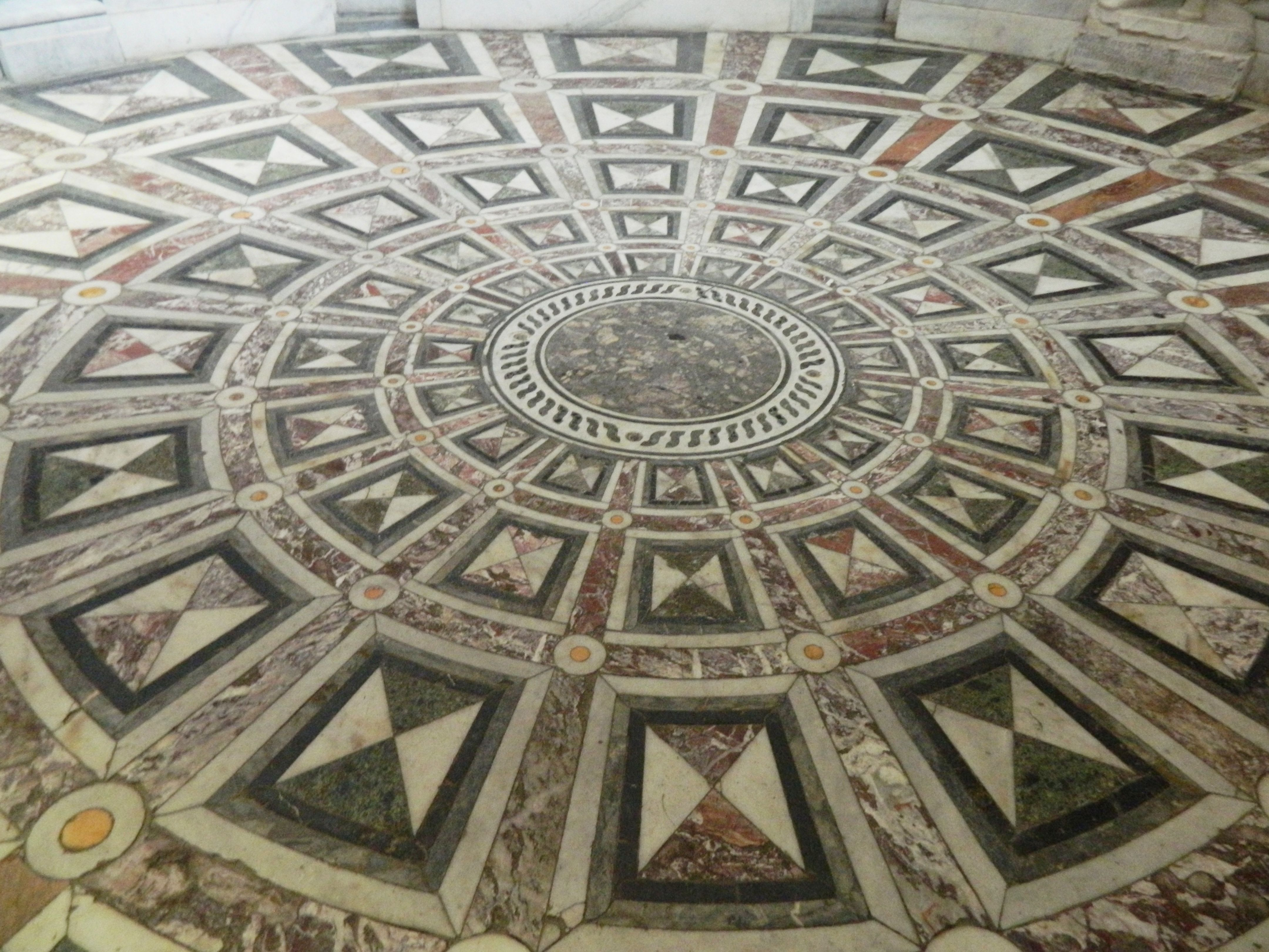 Cappella Caracciolo di Vico (Chiesa di San Giovanni a Carbonara di Napoli) - Pavimento marmorero (XVI secolo)